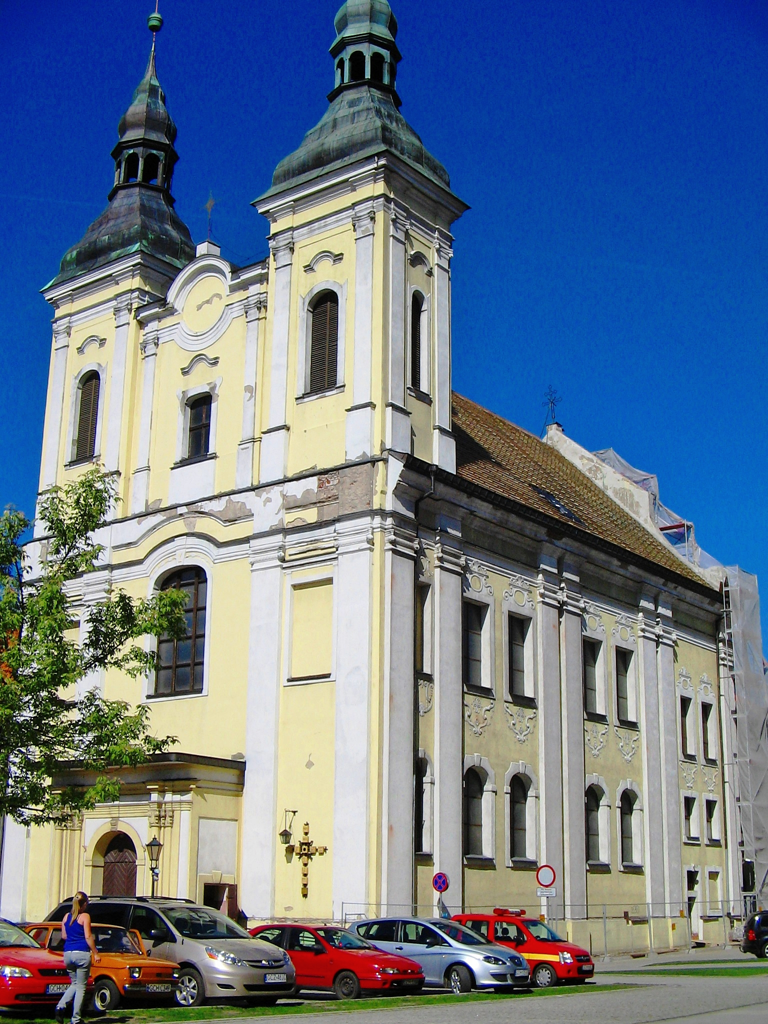 Chojnice, ul. Nowe Miasto - dawny kościół jezuicki, obecnie filialny p.w. Zwiastowania NMP, 1718-1755, 1868 (tzw. Kościół Gimnazjalny)